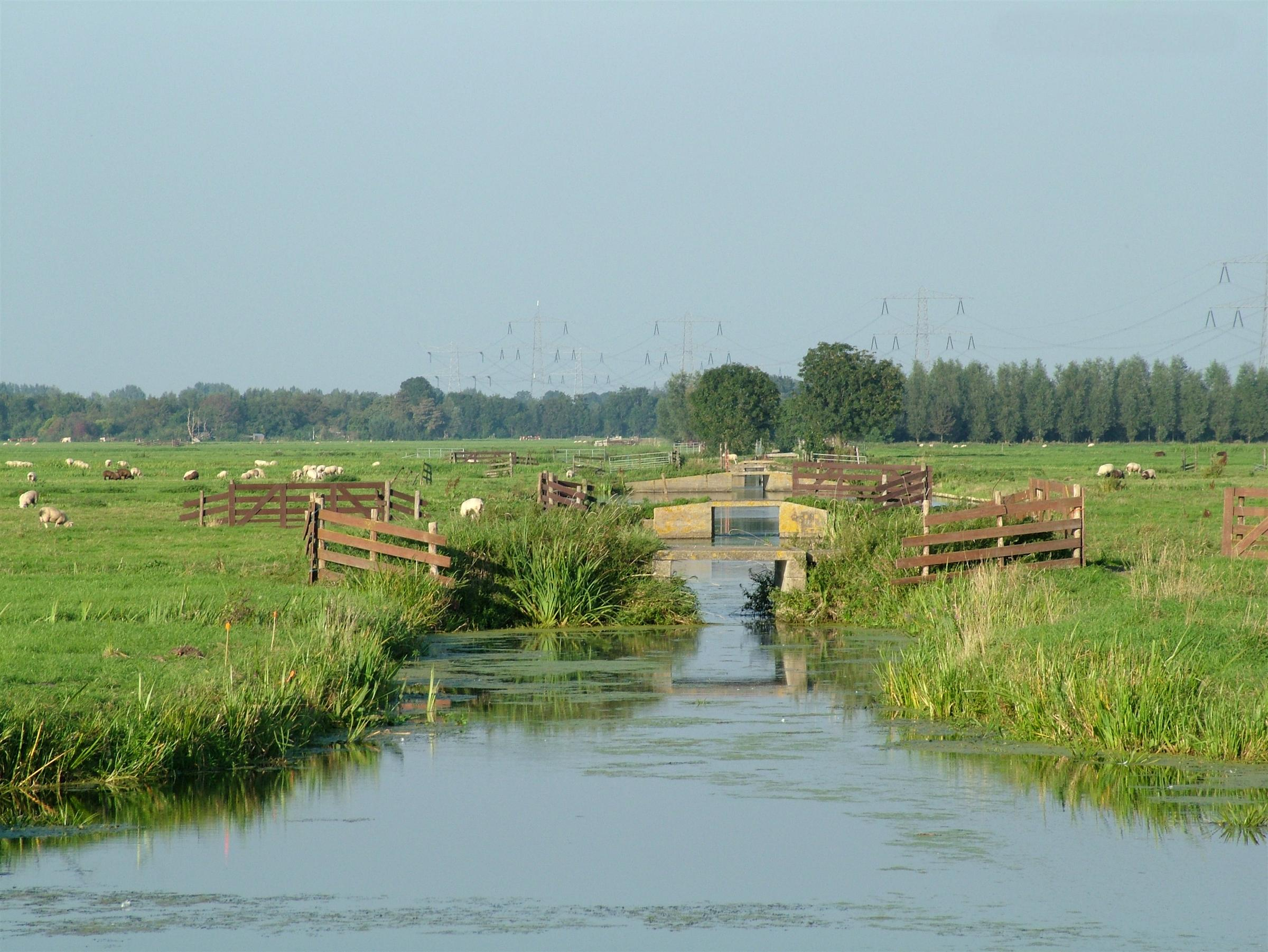 Beeld van de polder aan de noordzijde van 't Beijersche. Rondom de buurtschap ligt een typisch polderlandschap.